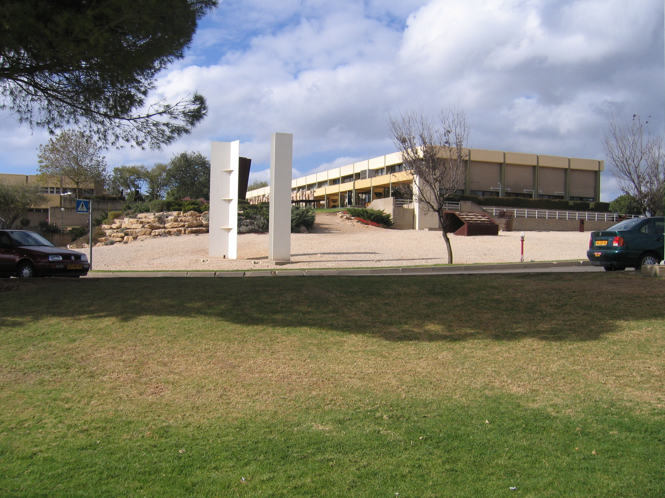 Tefen Open Museum